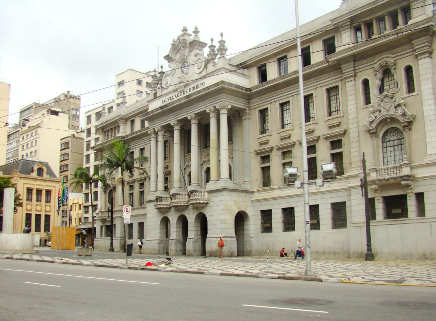 Faculdade de Direito, de 1827.